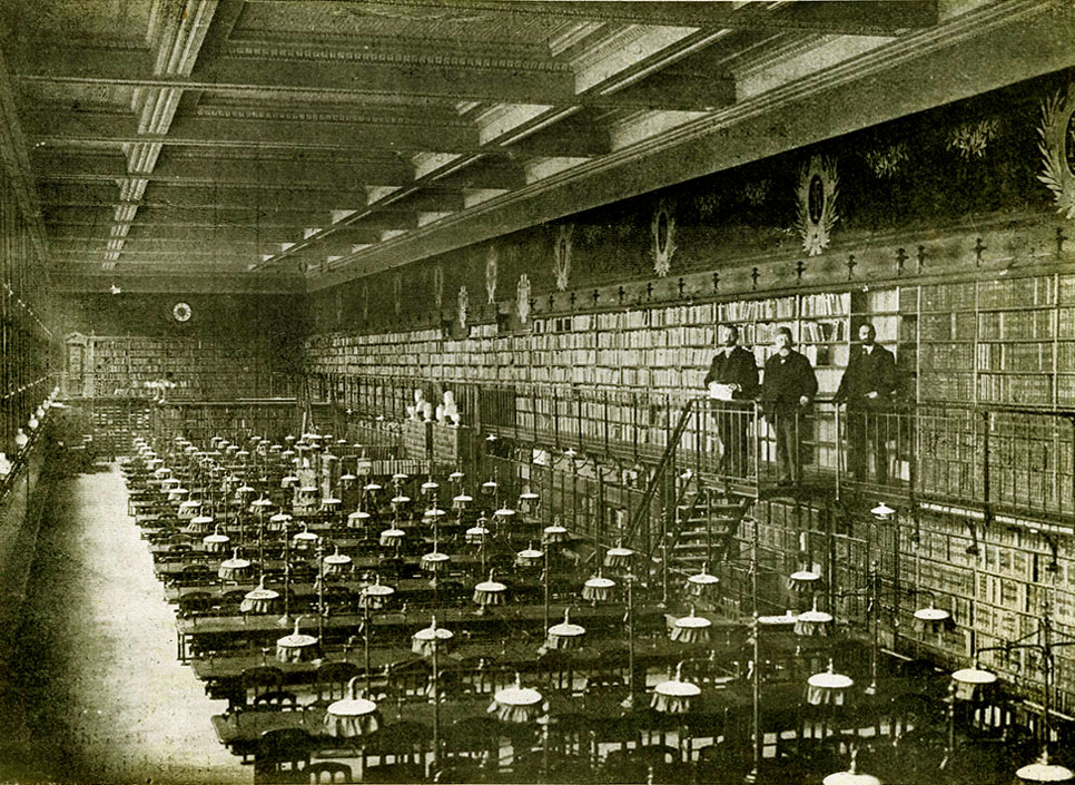 Faculté de médecine de Paris, bibliothèque, remaniement de la salle de lecture, 1908.